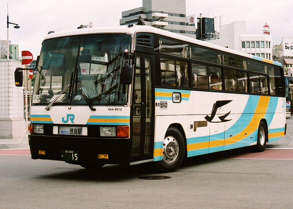 JR四国 高徳エクスプレス 三菱ふそう・エアロバス P-MS725SA改（644-8916 元JRバス関東）